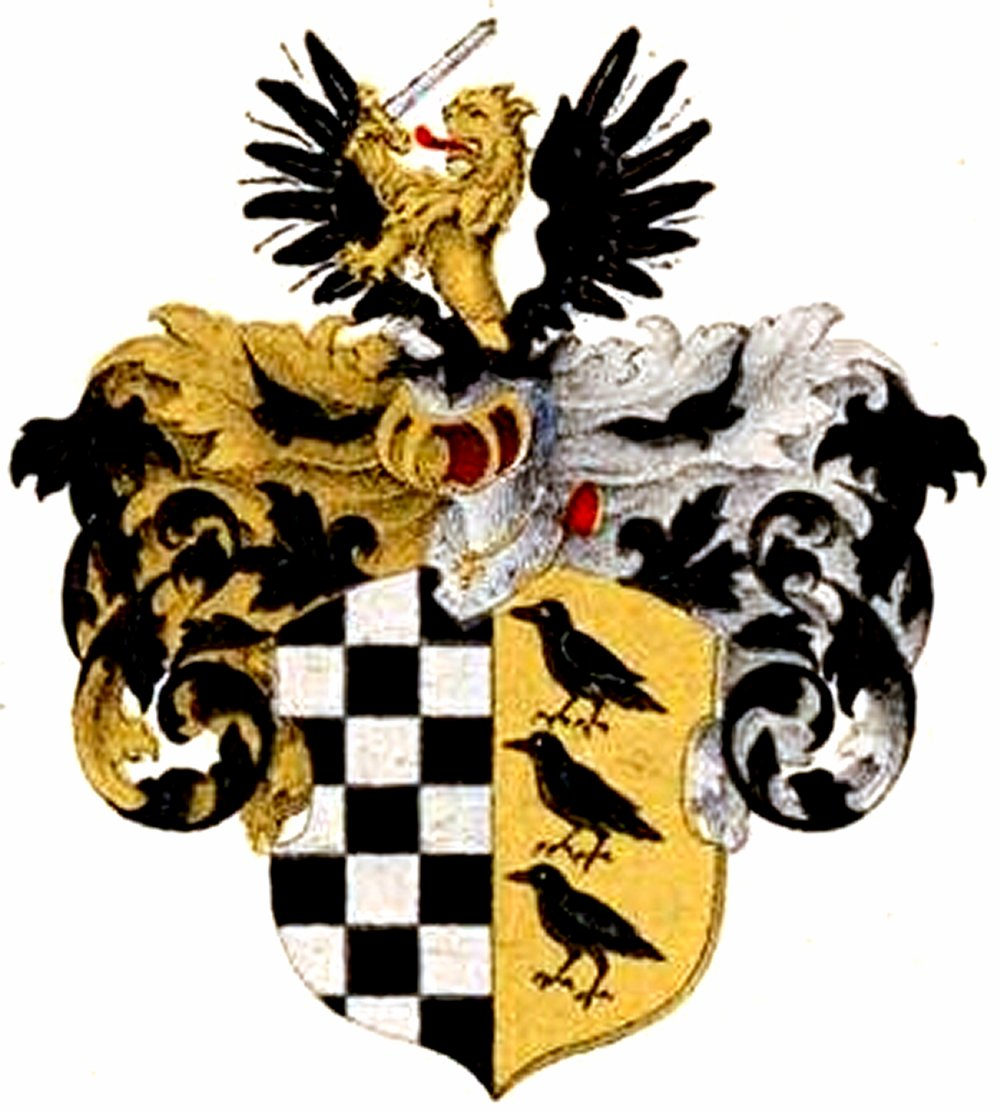 Paykulli suguvõsa aadlivapp